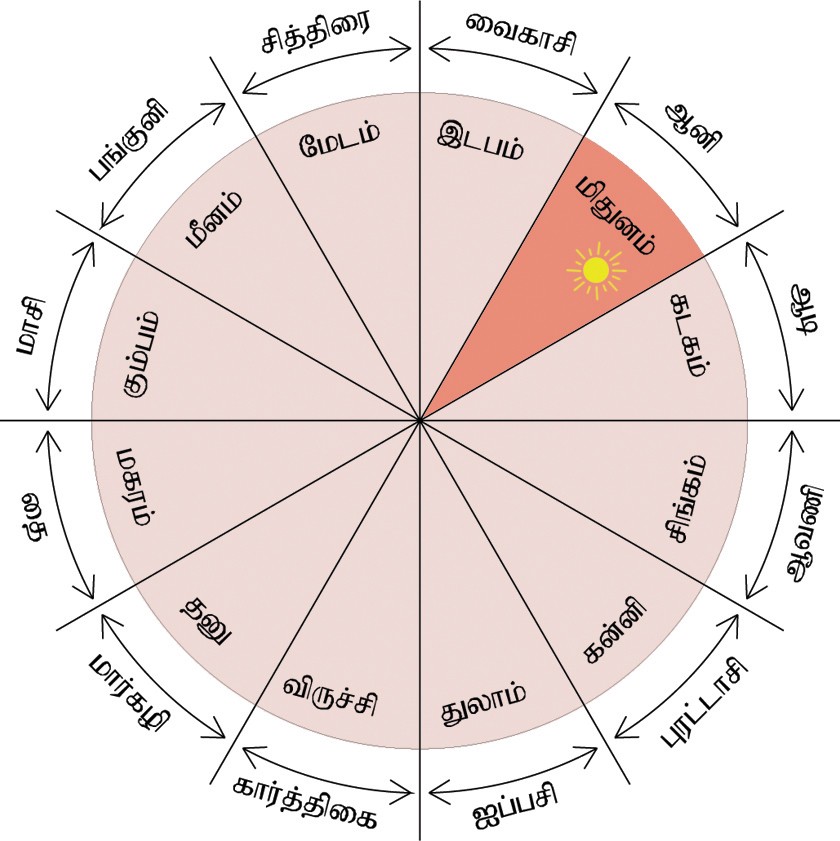 Drawn by the user who uploaded this.